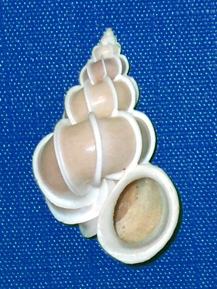 Epitonium Scalare Origine : Tayabas Bay, Philippines Remonté dans un filet de pêcheurs par 70 m de fond Auteur Michael Barruel (clmiadfl) Nice, France